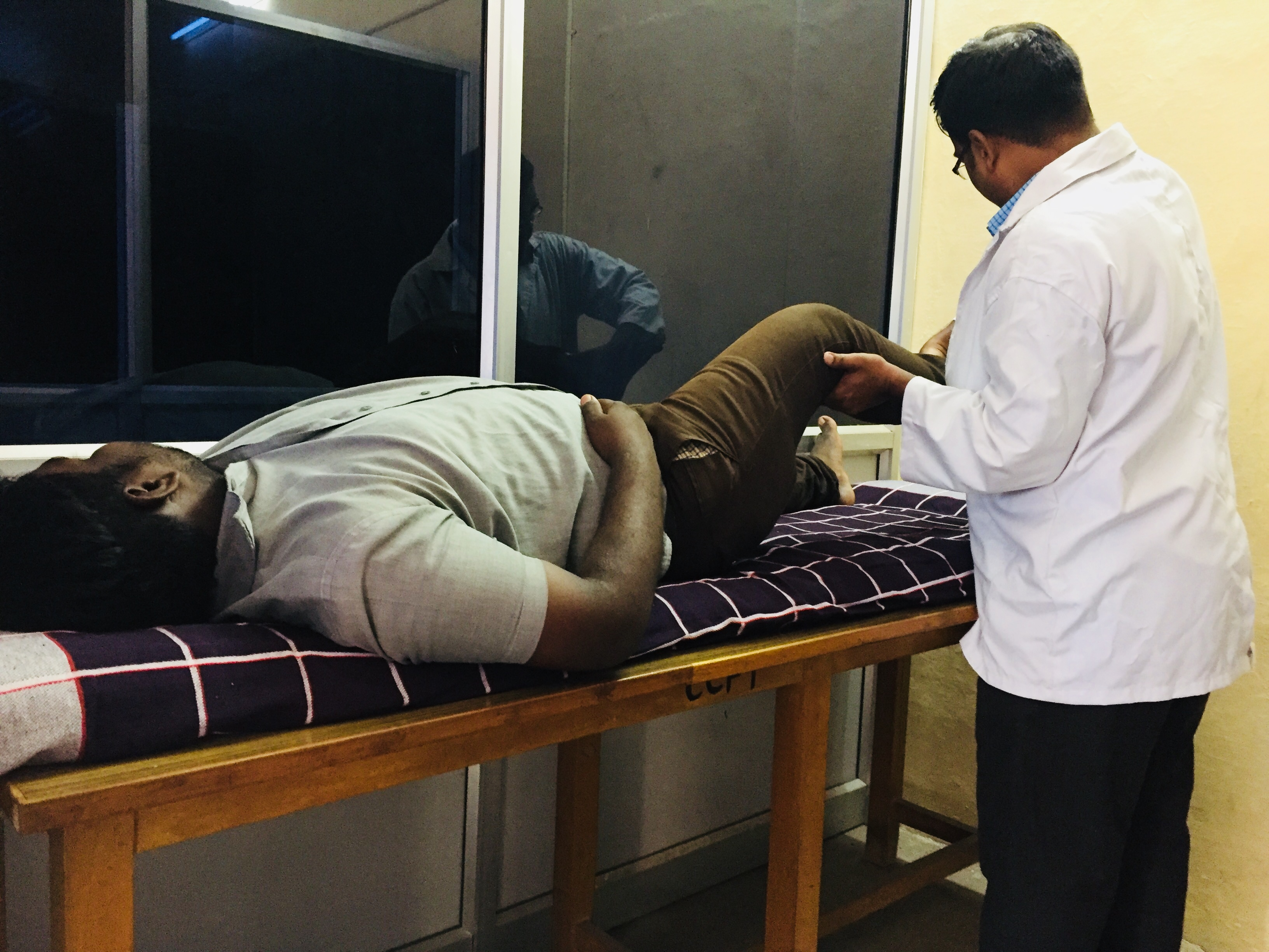 passive movements